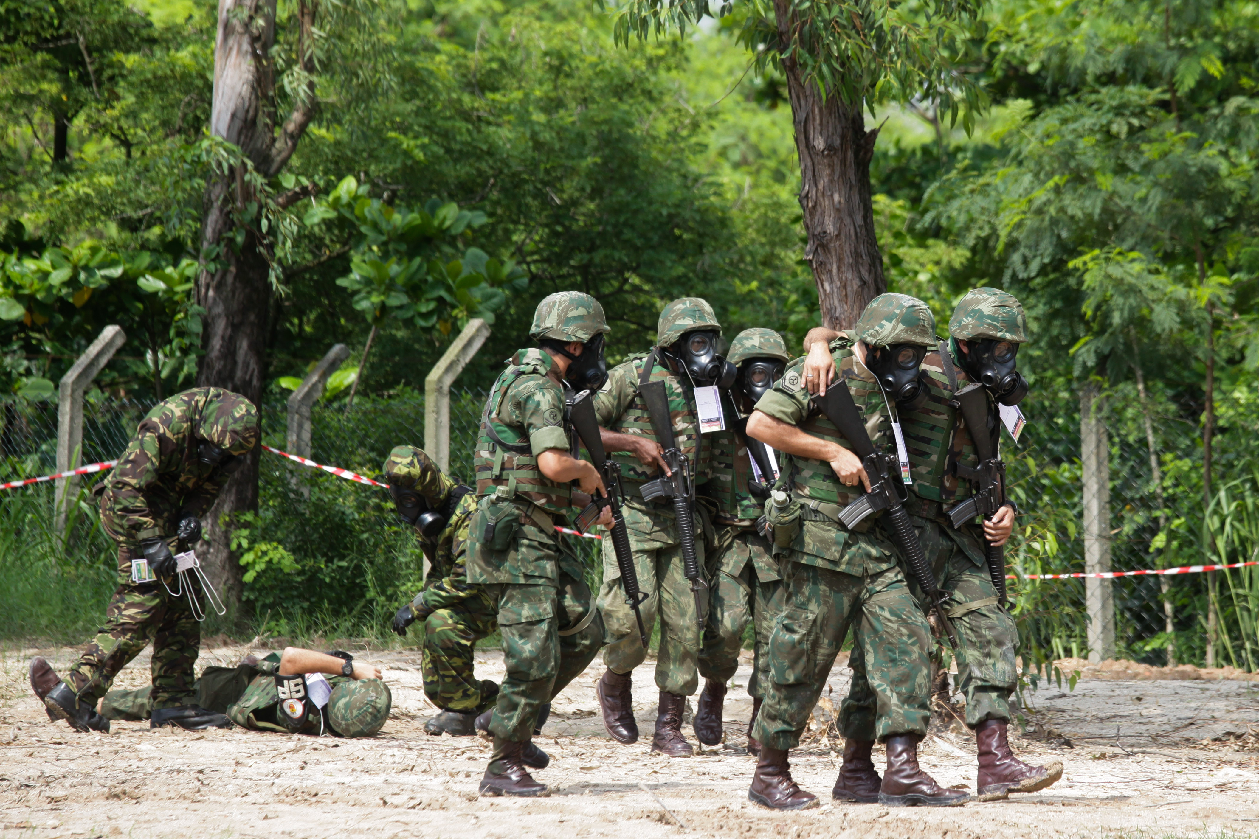 23 a 25/03/2015, Rio de Janeiro - RJ Fotos: Felipe Barra